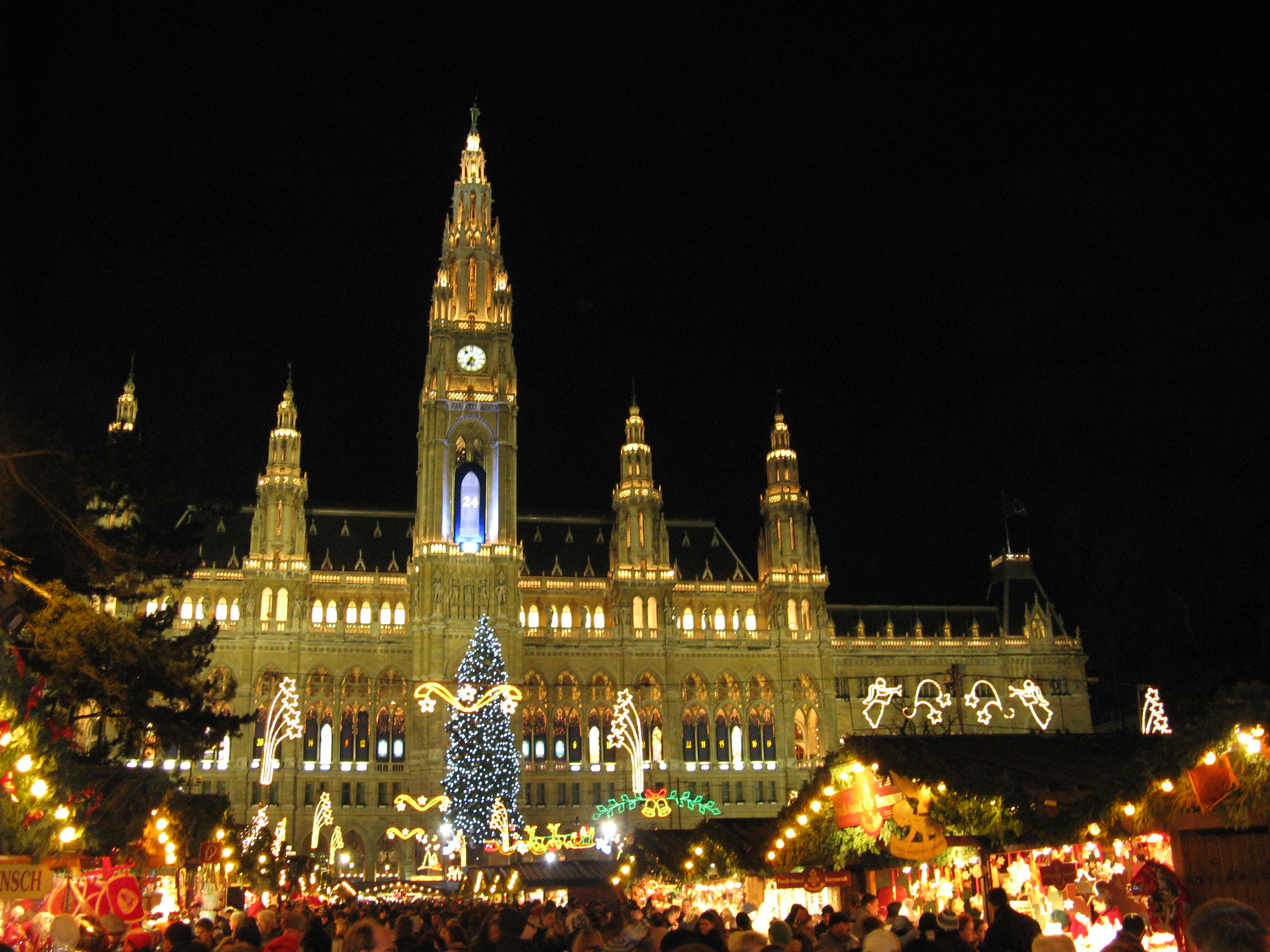 Christkindlmarkt am Wiener Rathaus